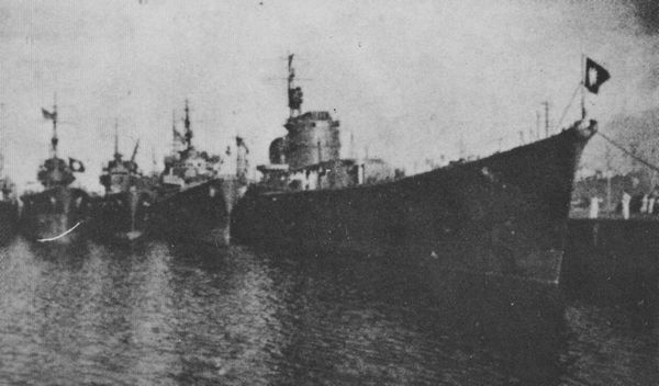 中華民國海軍 『汾陽』en: ROCN Fen Yang, ex Japanese Yoizuki (宵月)。